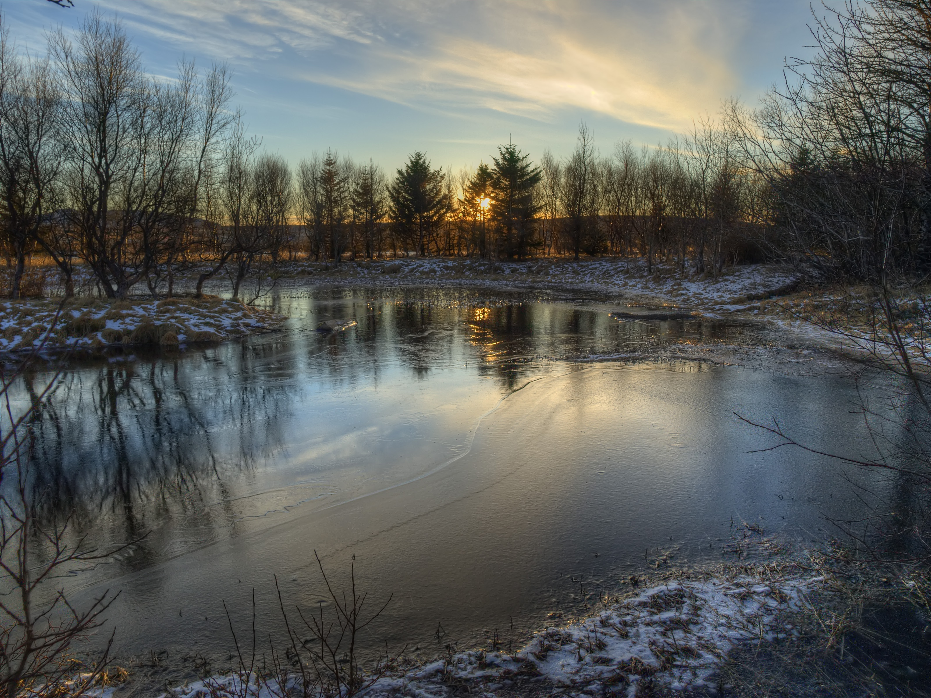 Mógilsá